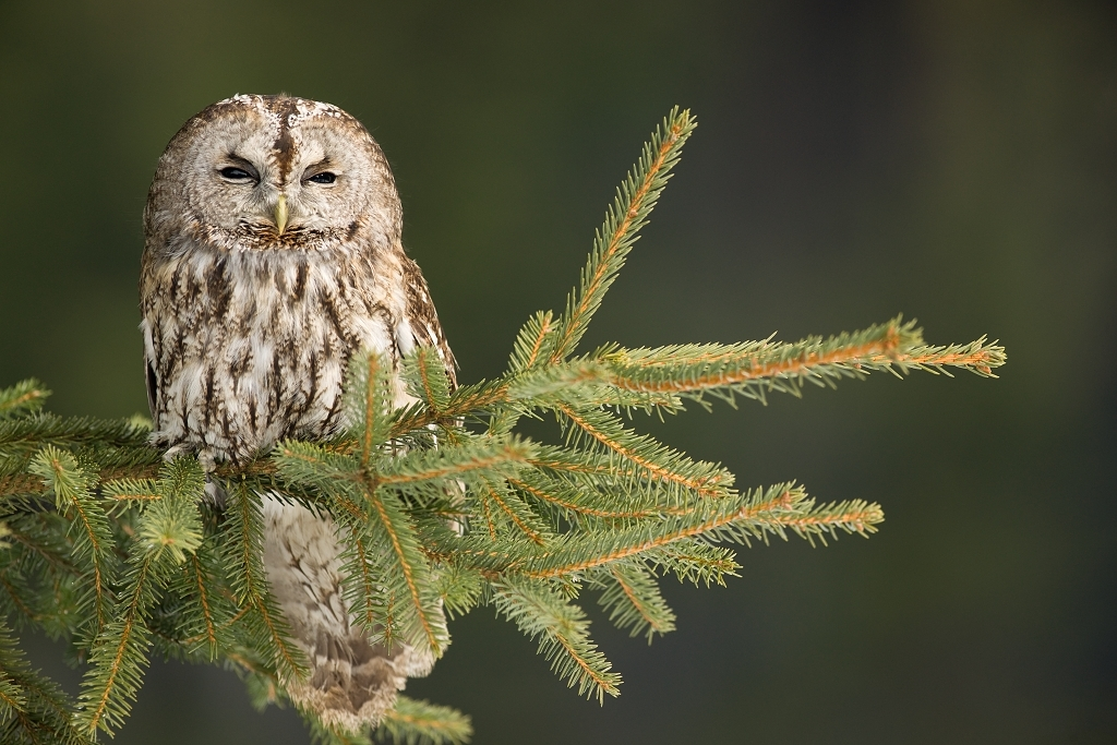 Strix aluco, Herálec, Czech Republic